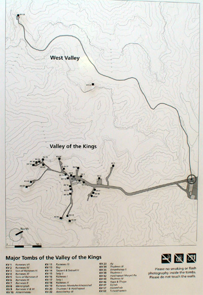 Fotografija vhodne table v Dolino kraljev, obrezana, slikano aprila 2004